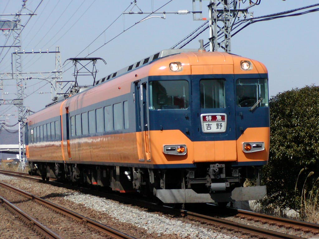 近鉄 16010系